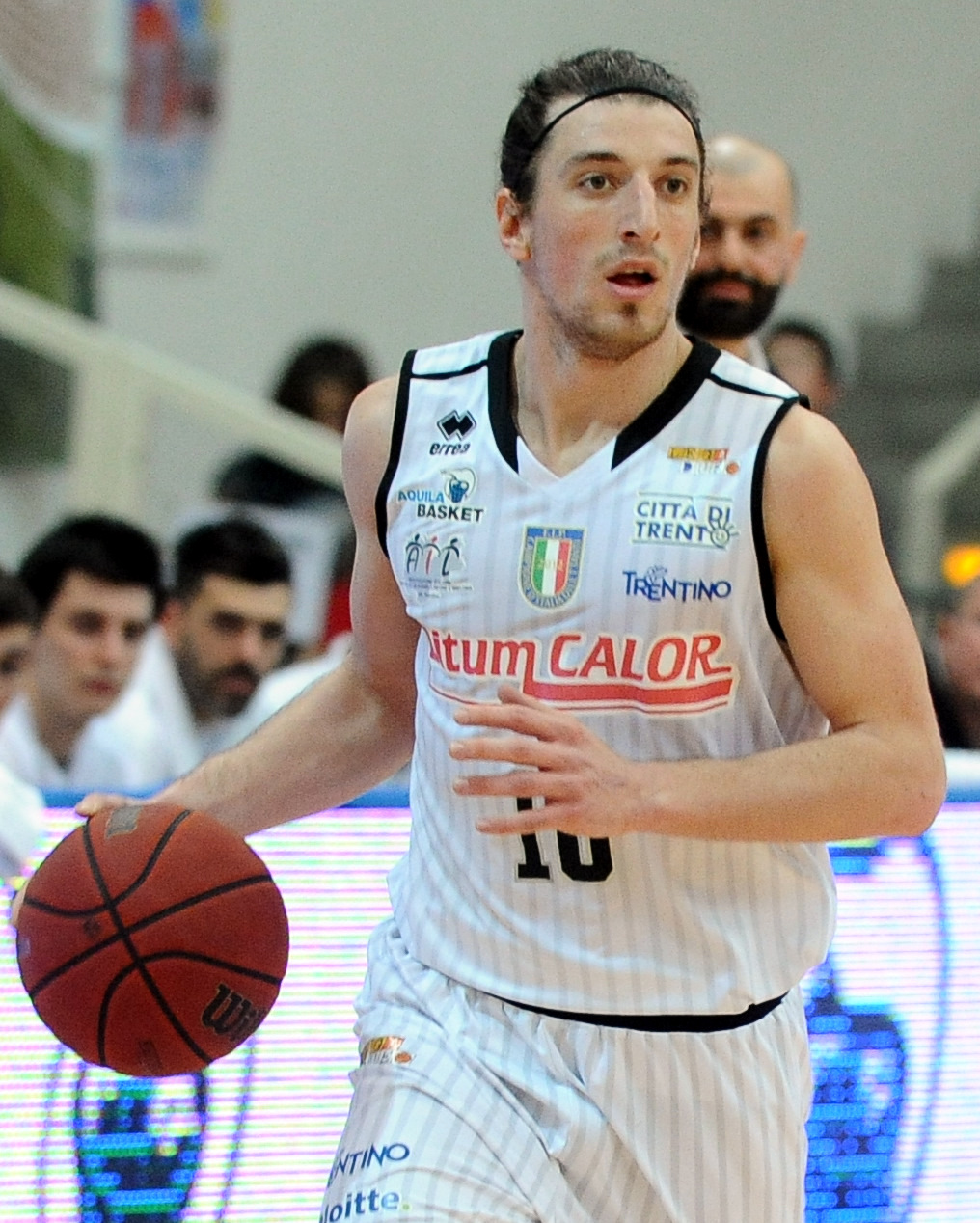 Toto Forray con la maglia dell'Aquila Basket Trento.